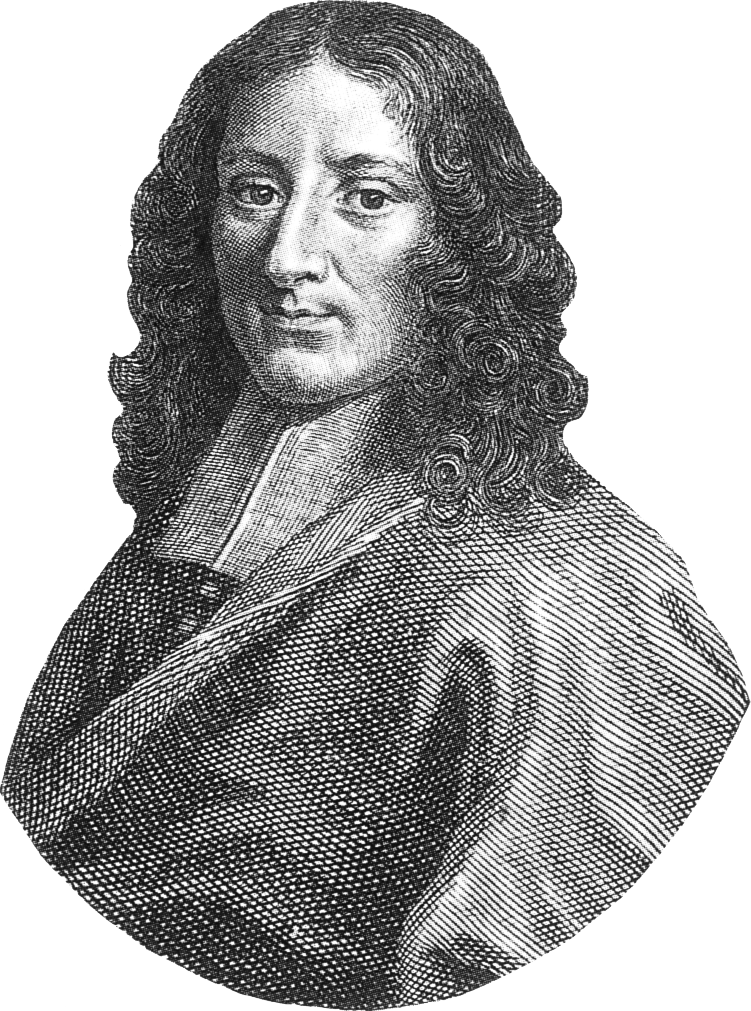 Portrait de Pierre Bayle